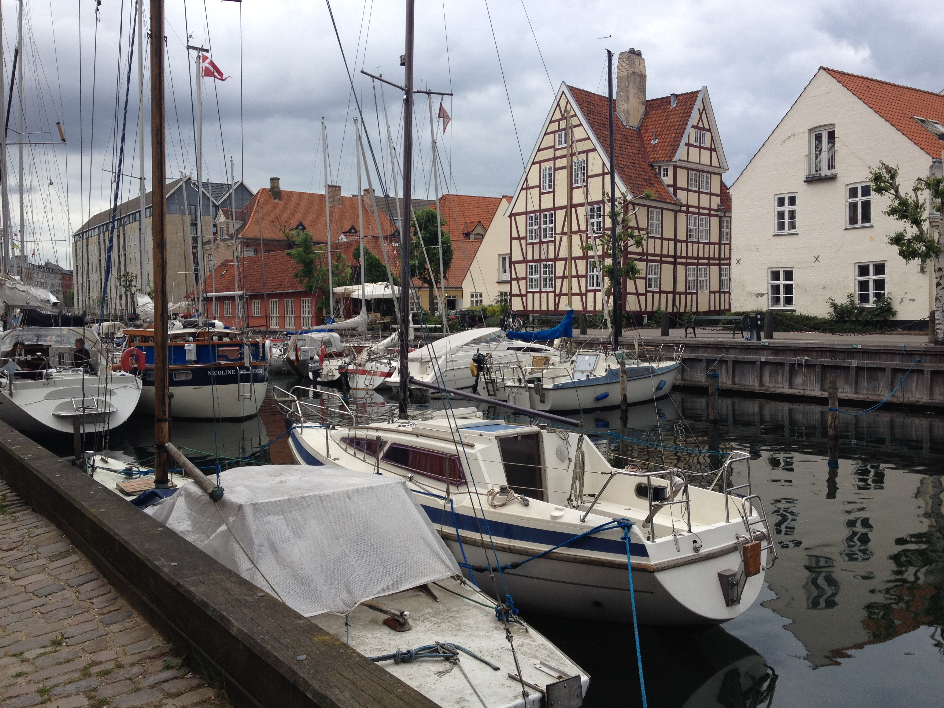 Wilders Plads at Christianshavn in Copenhagen, Denmark